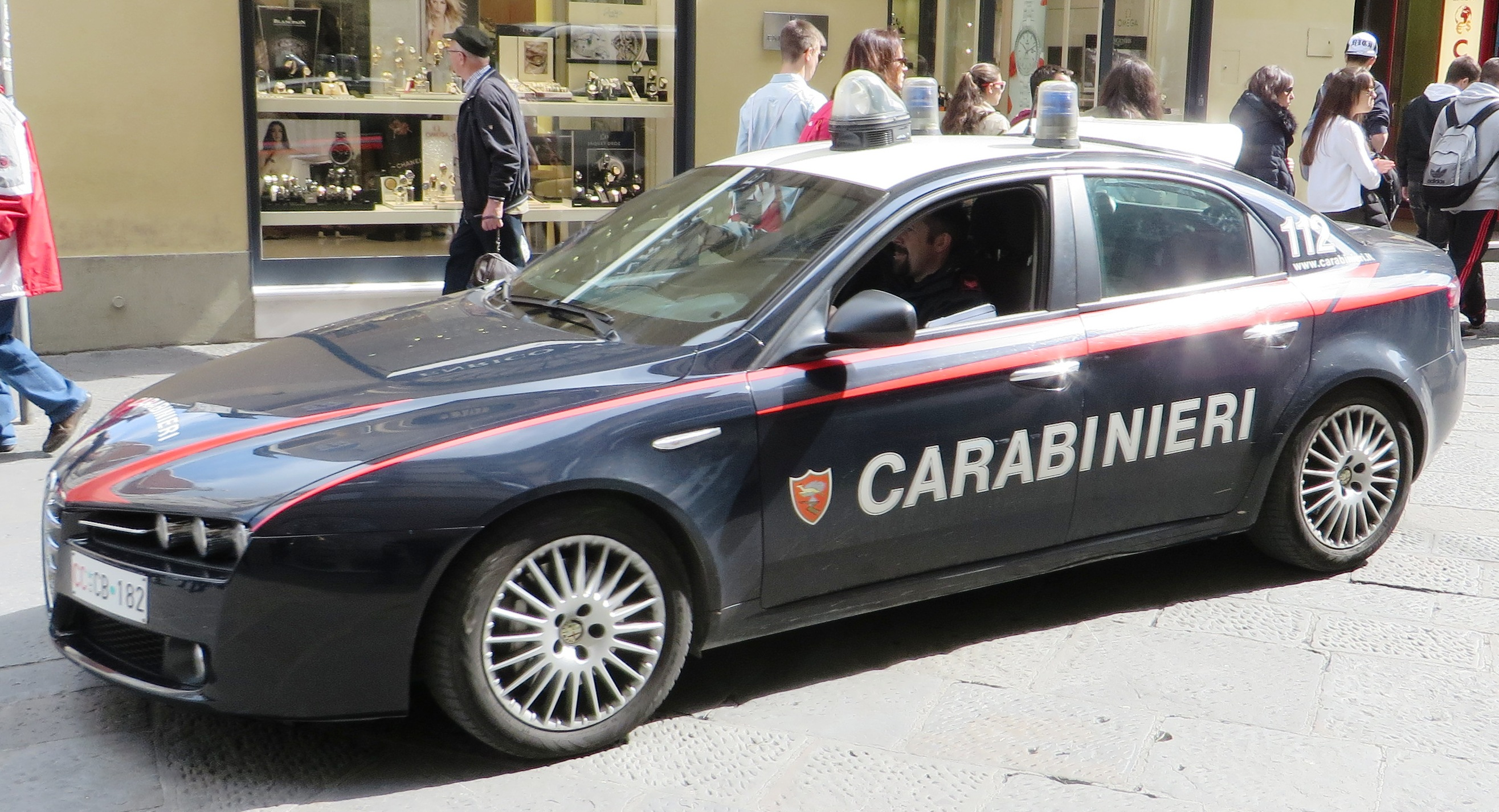 Carabinieri